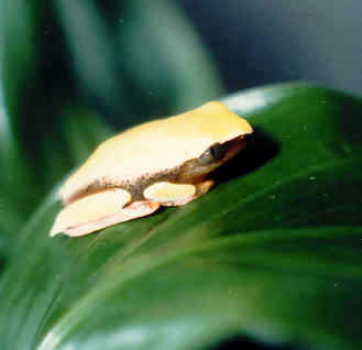 Phrynomedusa marginata